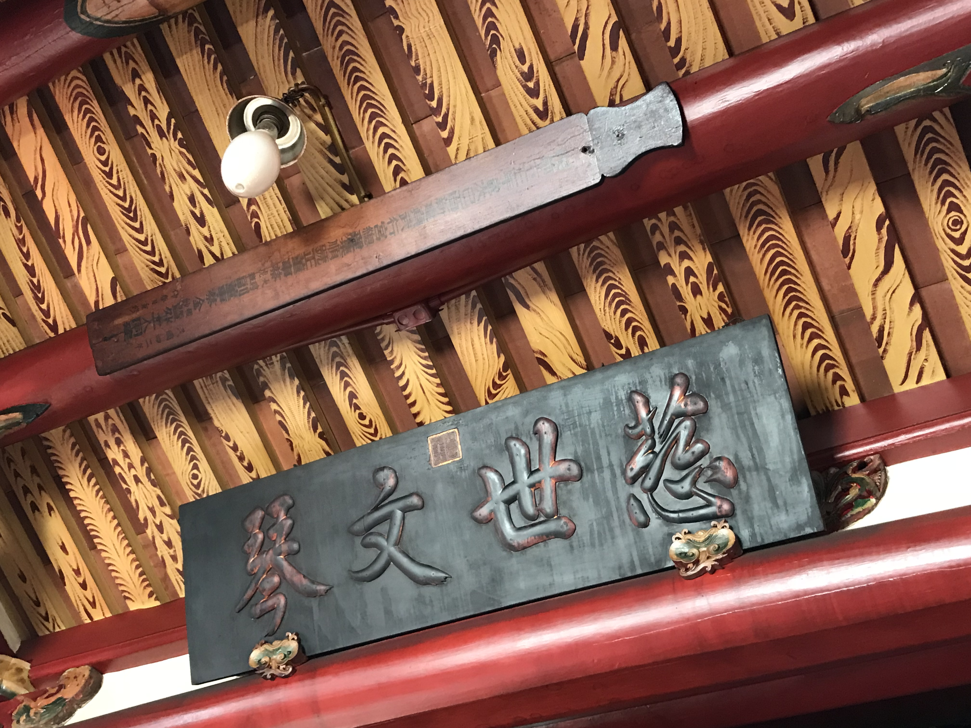 中文（台灣）: 梧棲真武宮籤形木匾與「慈世文琴」匾額